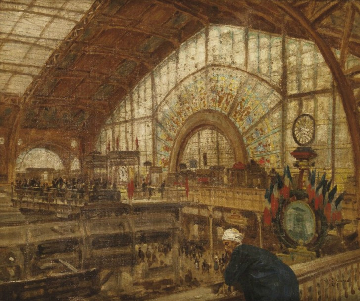 Louis Béroud. La Galerie des Machines, Exposition Universelle de 1889 (1890)